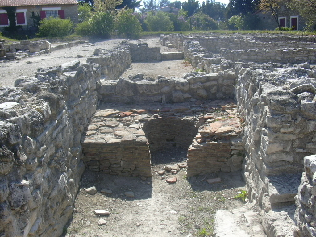 Vue du four dans les ruines de l'Oppidum d'Entremont, Aix-en-Provence, France